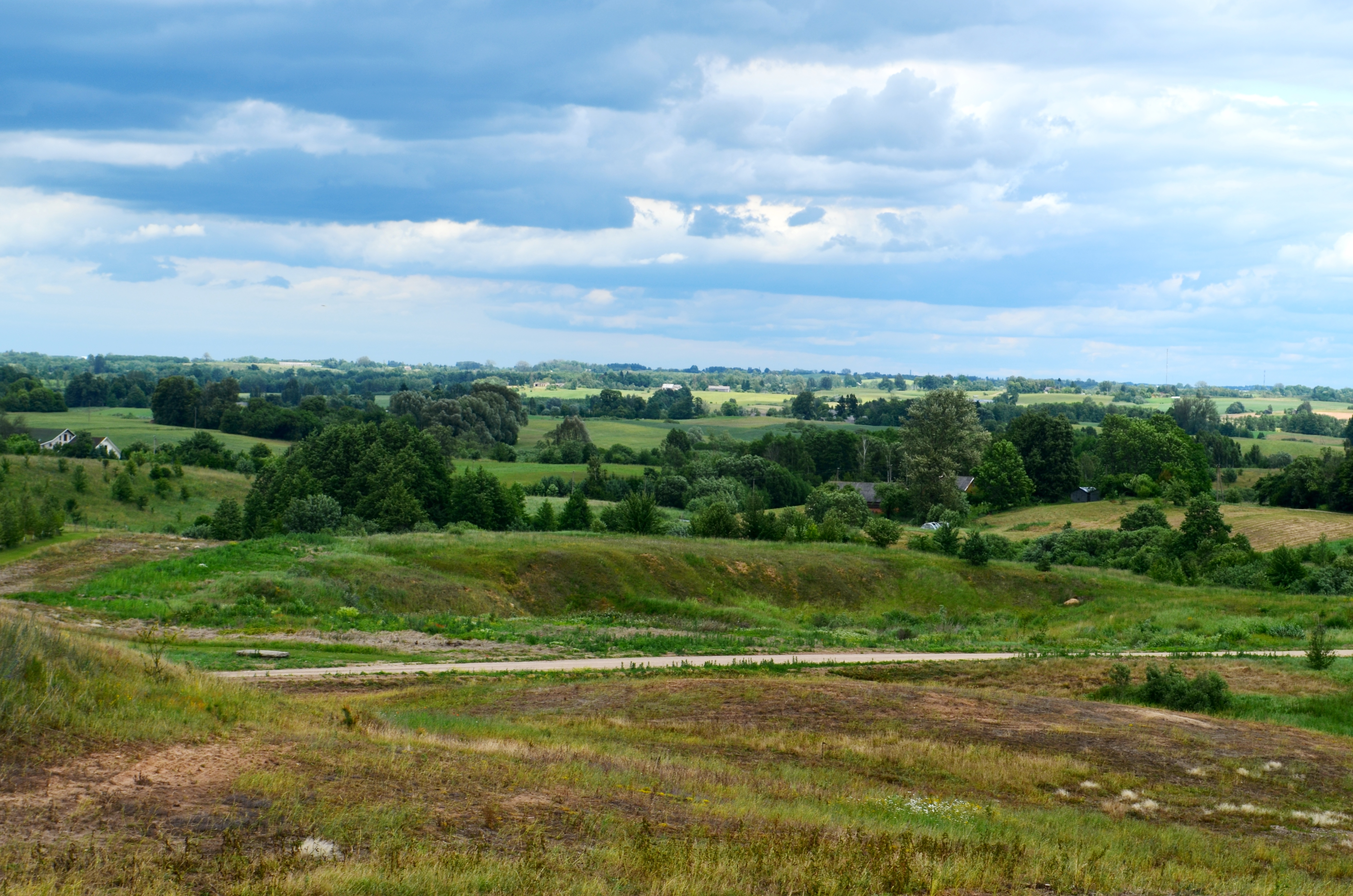 Obelninkai, Alytaus raj.